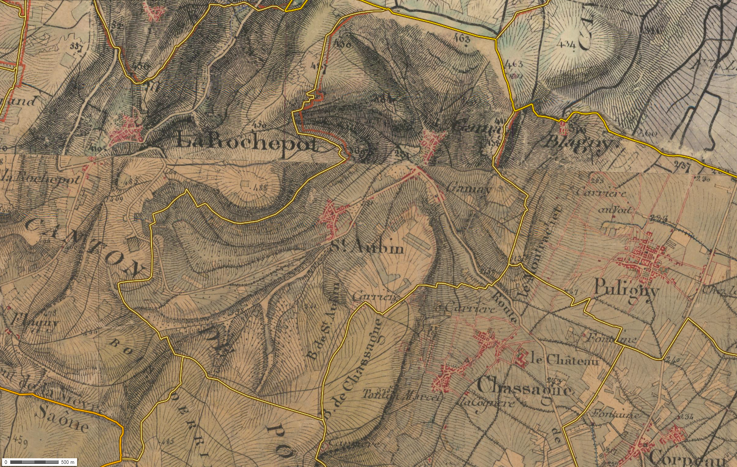 Feuille « Beaune » de la carte d'état-major, publiée en 1866 à l'échelle 1/40000, centrée sur la commune de Saint-Aubin.